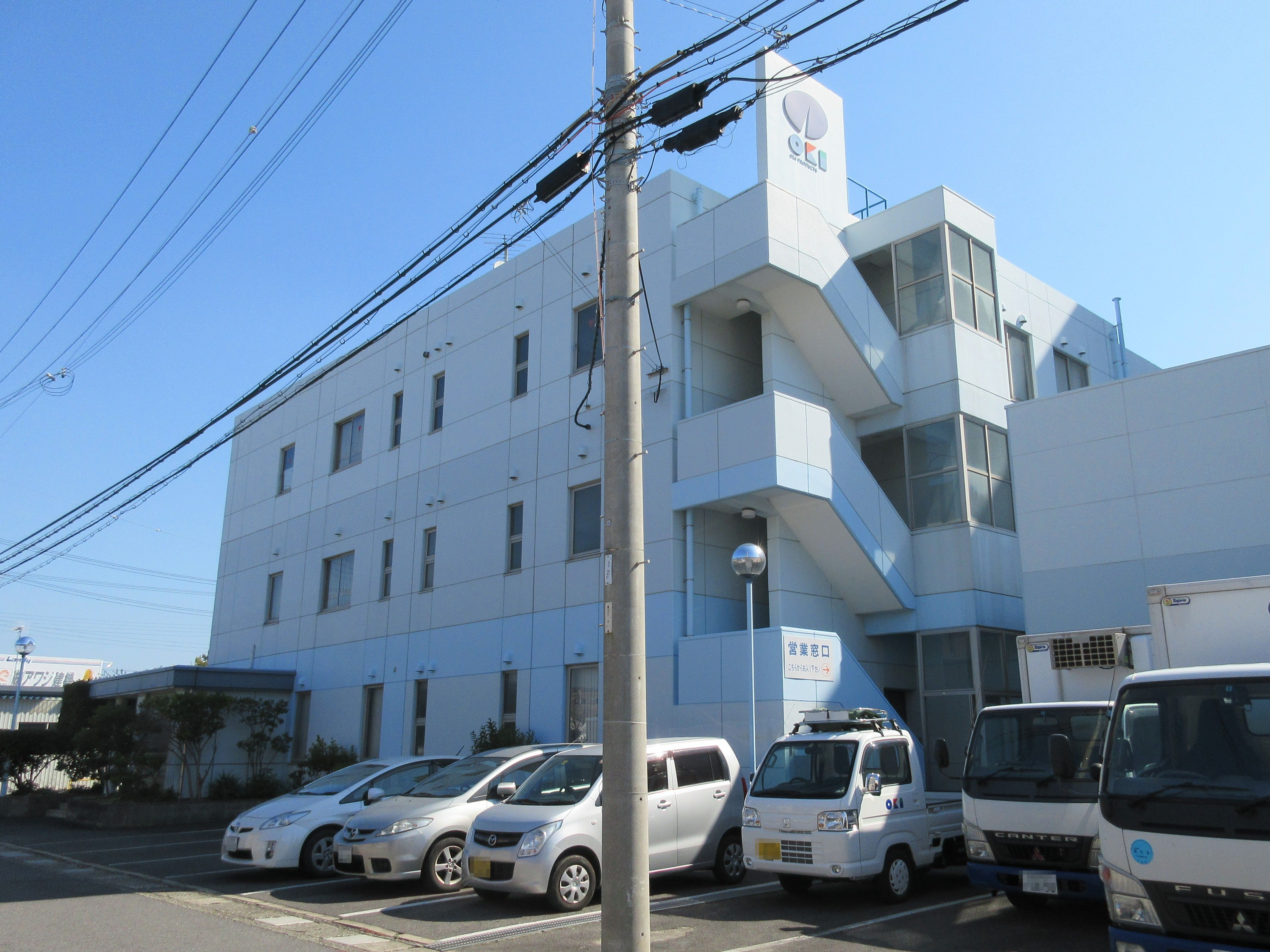 沖物産本社